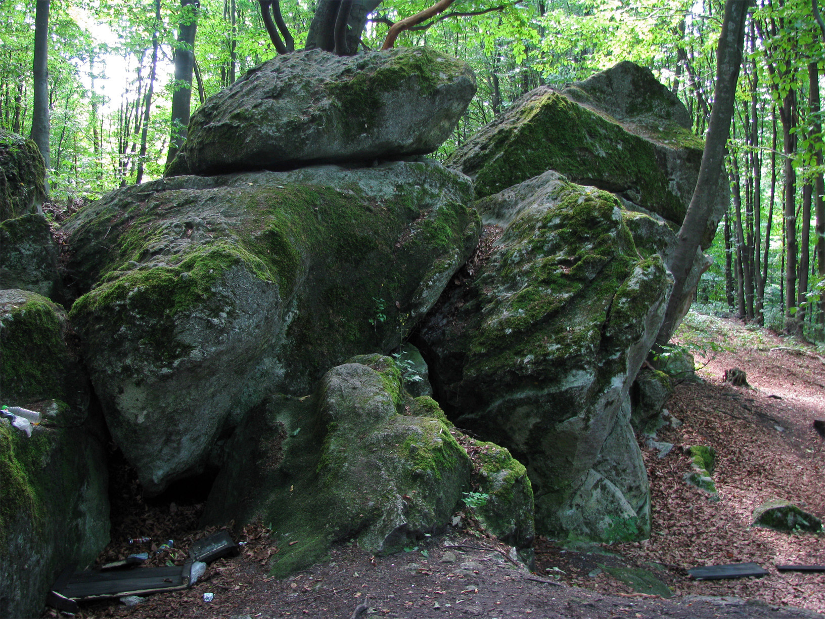 Skały na szczycie wzgórza Kamień (Piekiełko) k. Stanisławowa na Roztoczu Środkowym